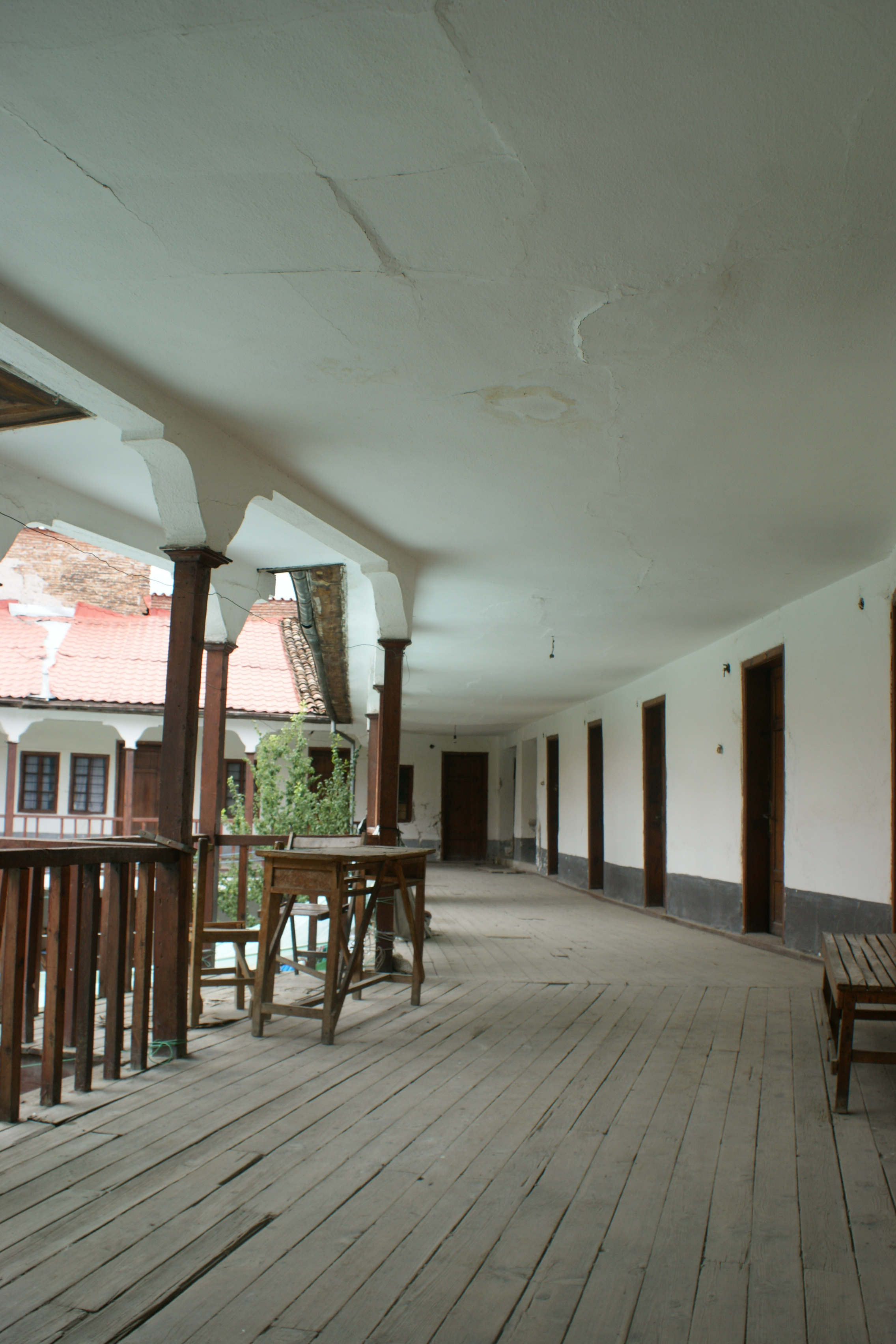 Hani "elbasani"